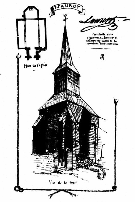 Dessin de l'église de Nauroy en 1874 par Joachim Malézieux